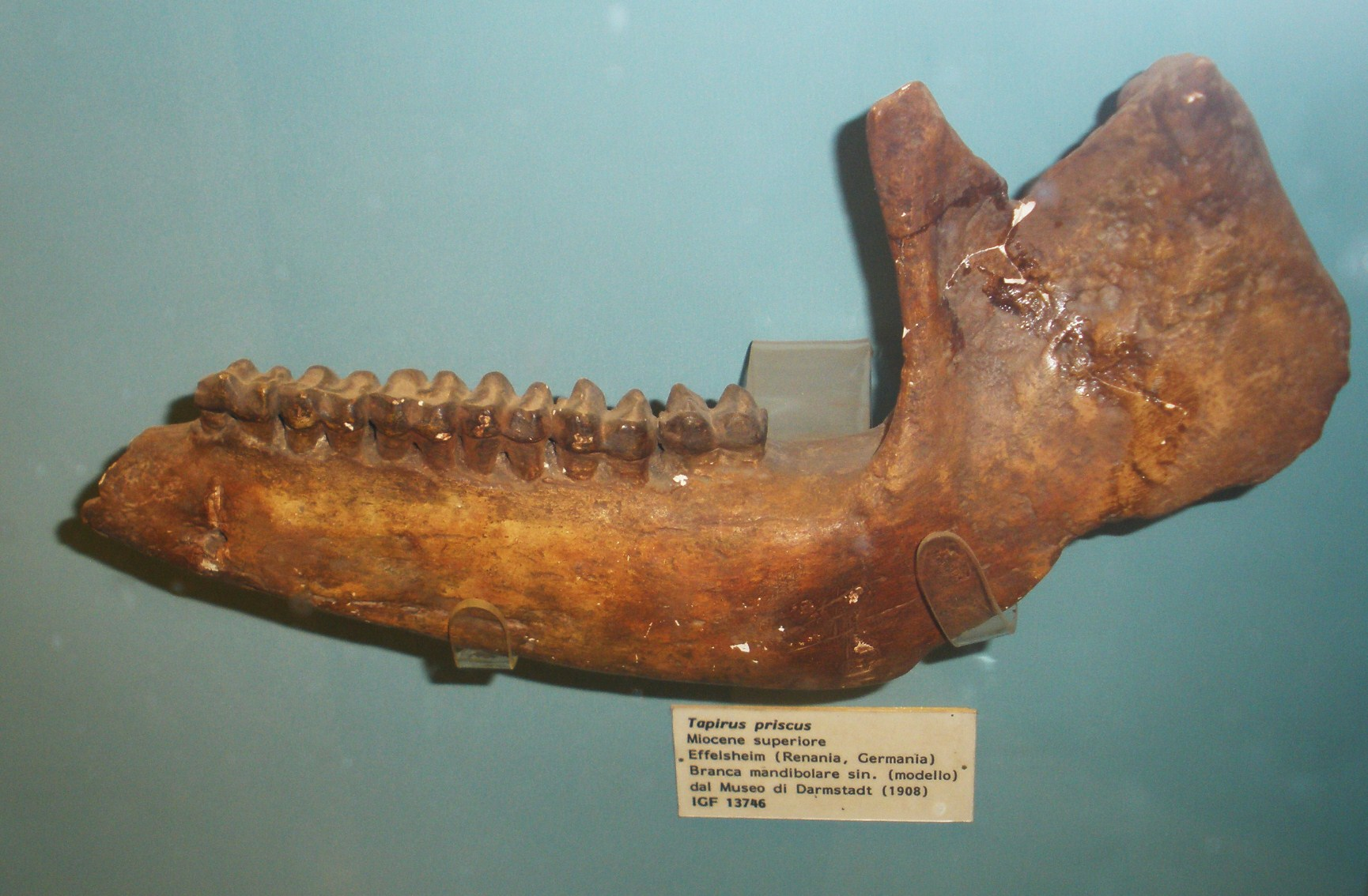 Fossil of Tapirus, an extinct mammal -- Topok the picture at Museo di Paleontologia di Firenze